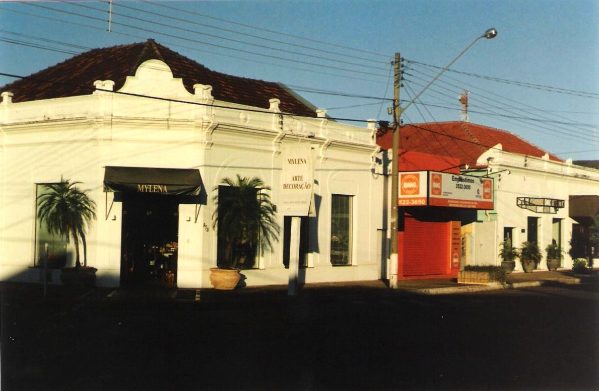 Descrição: Região central de Três Lagoas, Mato Grosso do Sul, Brasil. 2007.